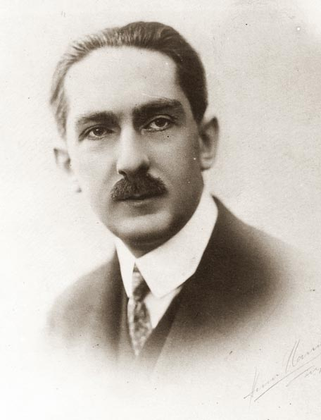 Władysław Folkierski